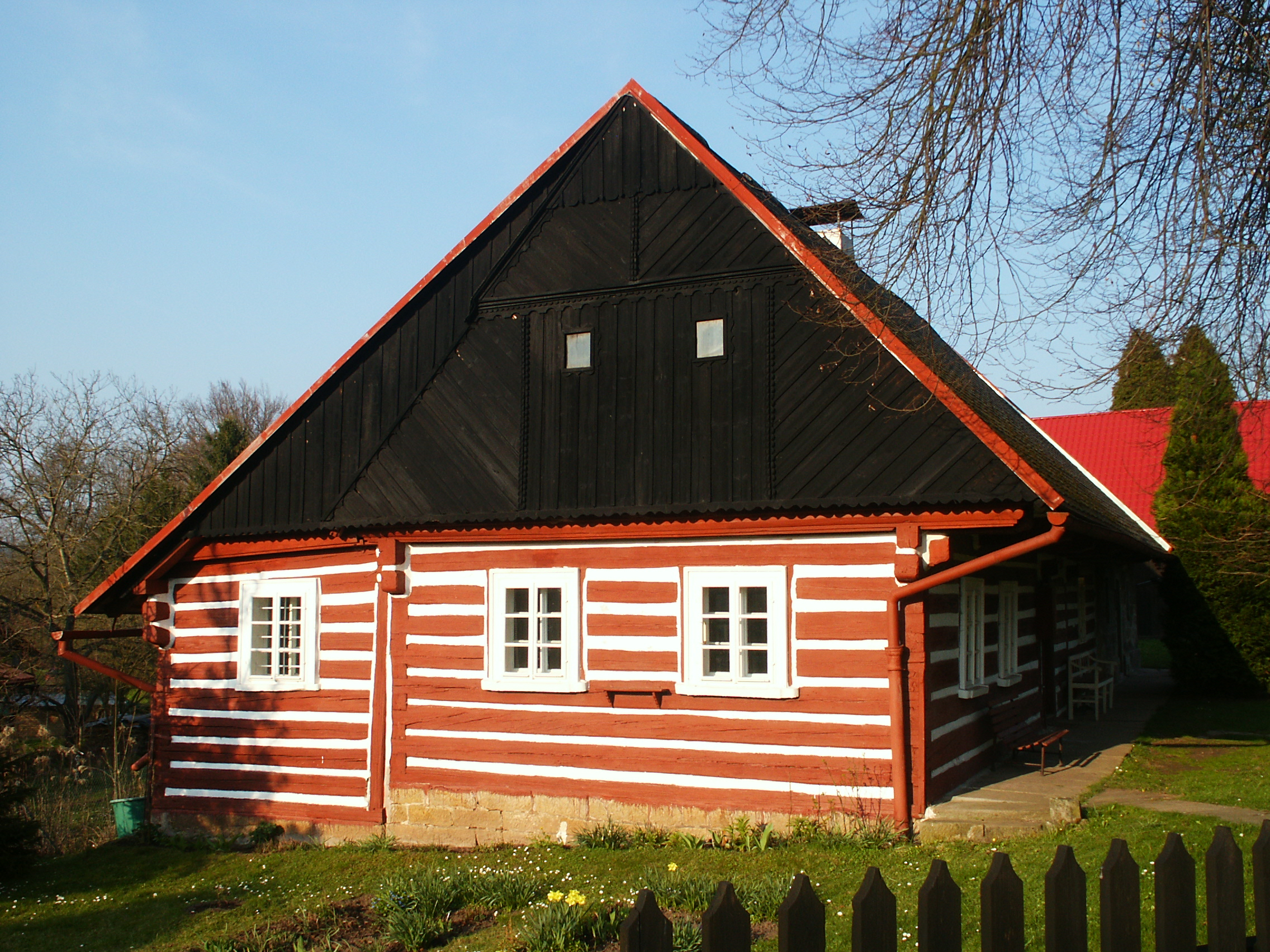 Úlibice - č.p.16